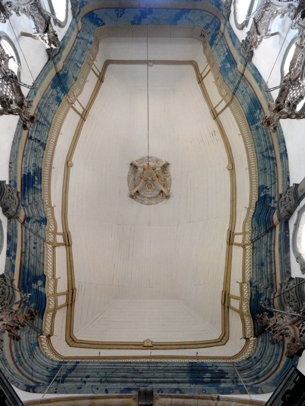 Igreja de São Francisco de Assis em São João del-Rei, teto da nave.